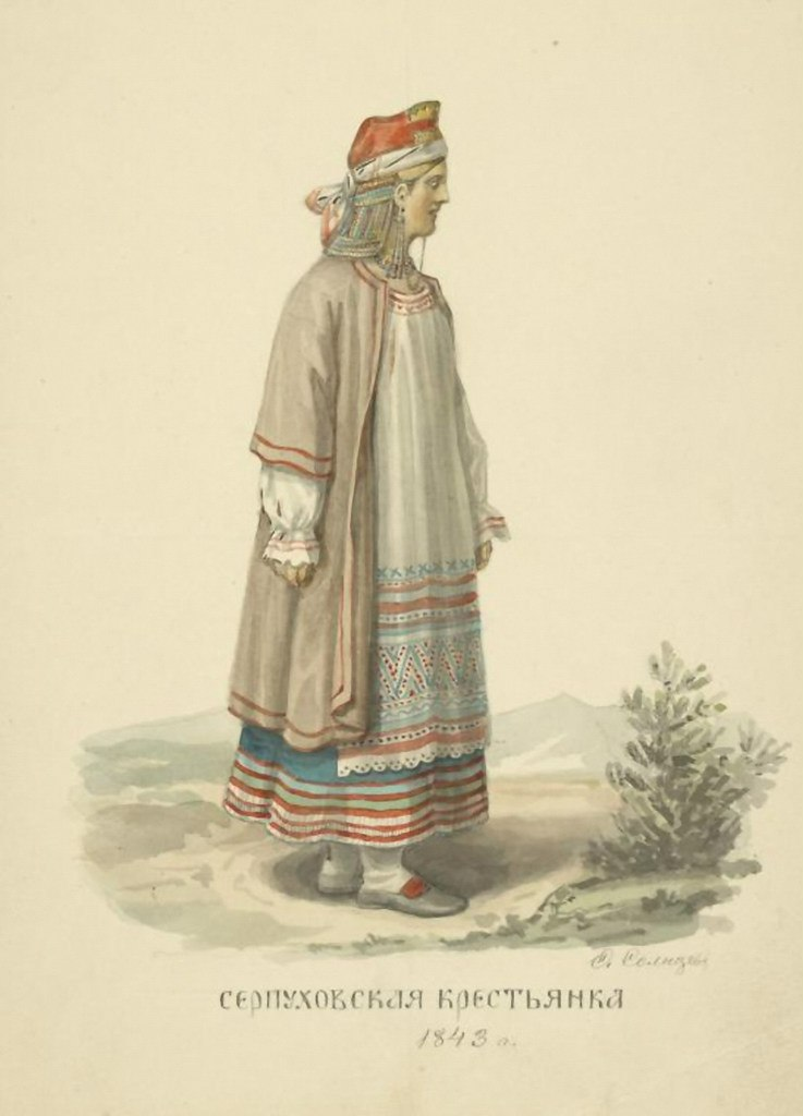 Солнцев Ф. Г. Серпуховская крестьянка, 1843 год. «Одежды Русского государства».